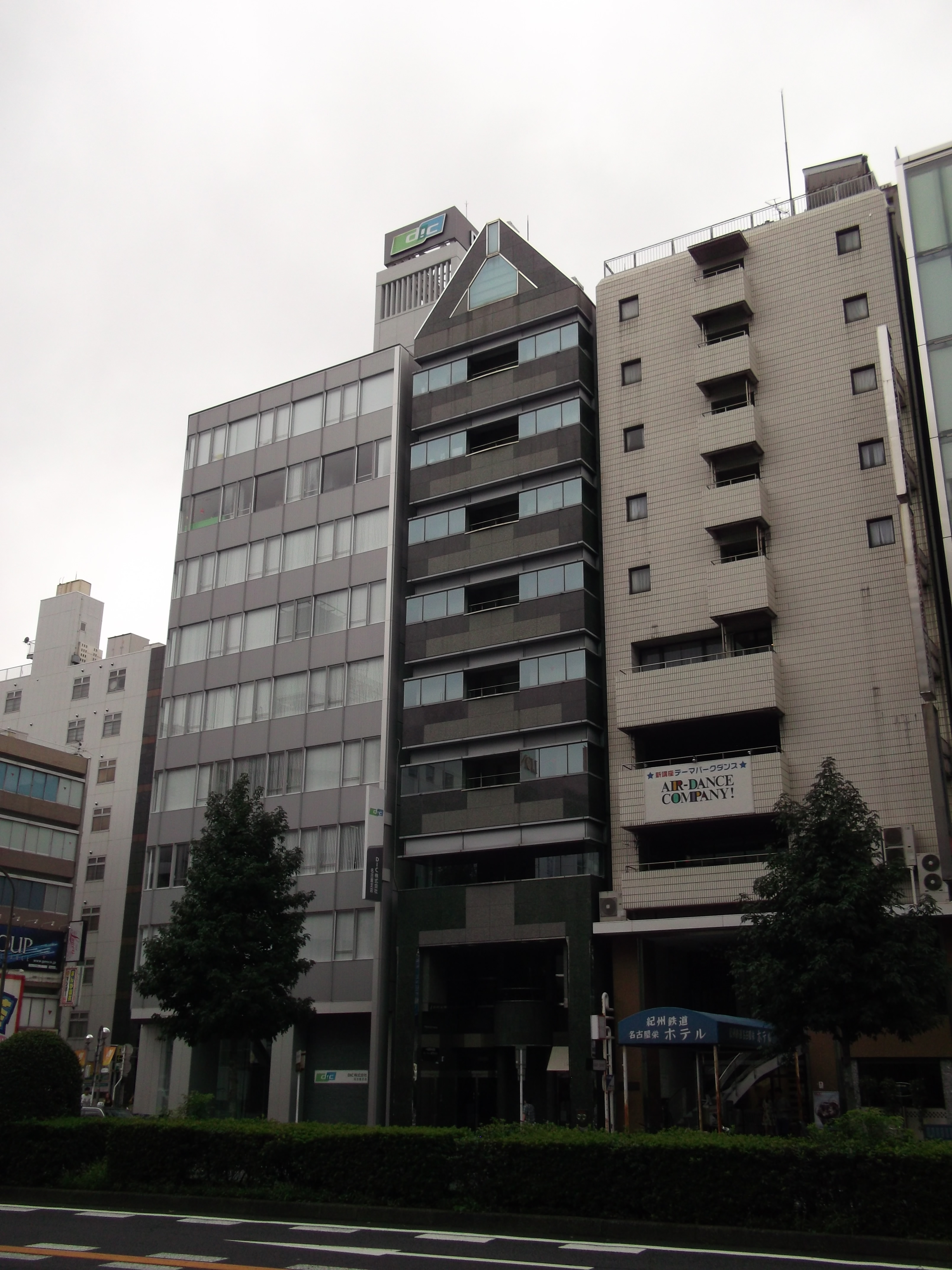 名古屋市中区のATビルを東側公道より撮影